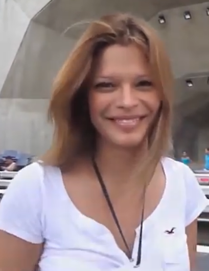 Mariangel Ruiz en apoyo a Maickel Melamed